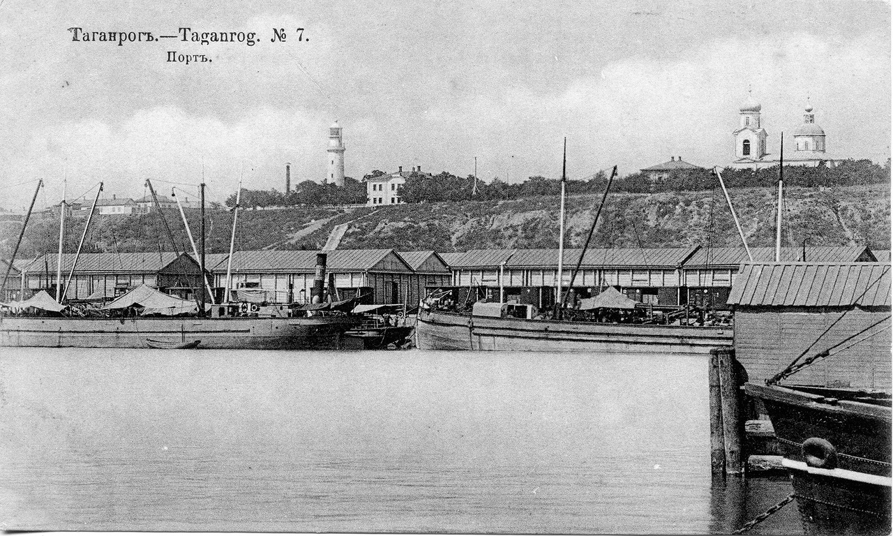 Вид на Таганий Рог со стороны порта, Таганрог, 1900. Видны Маяк и Троицкая церковь.